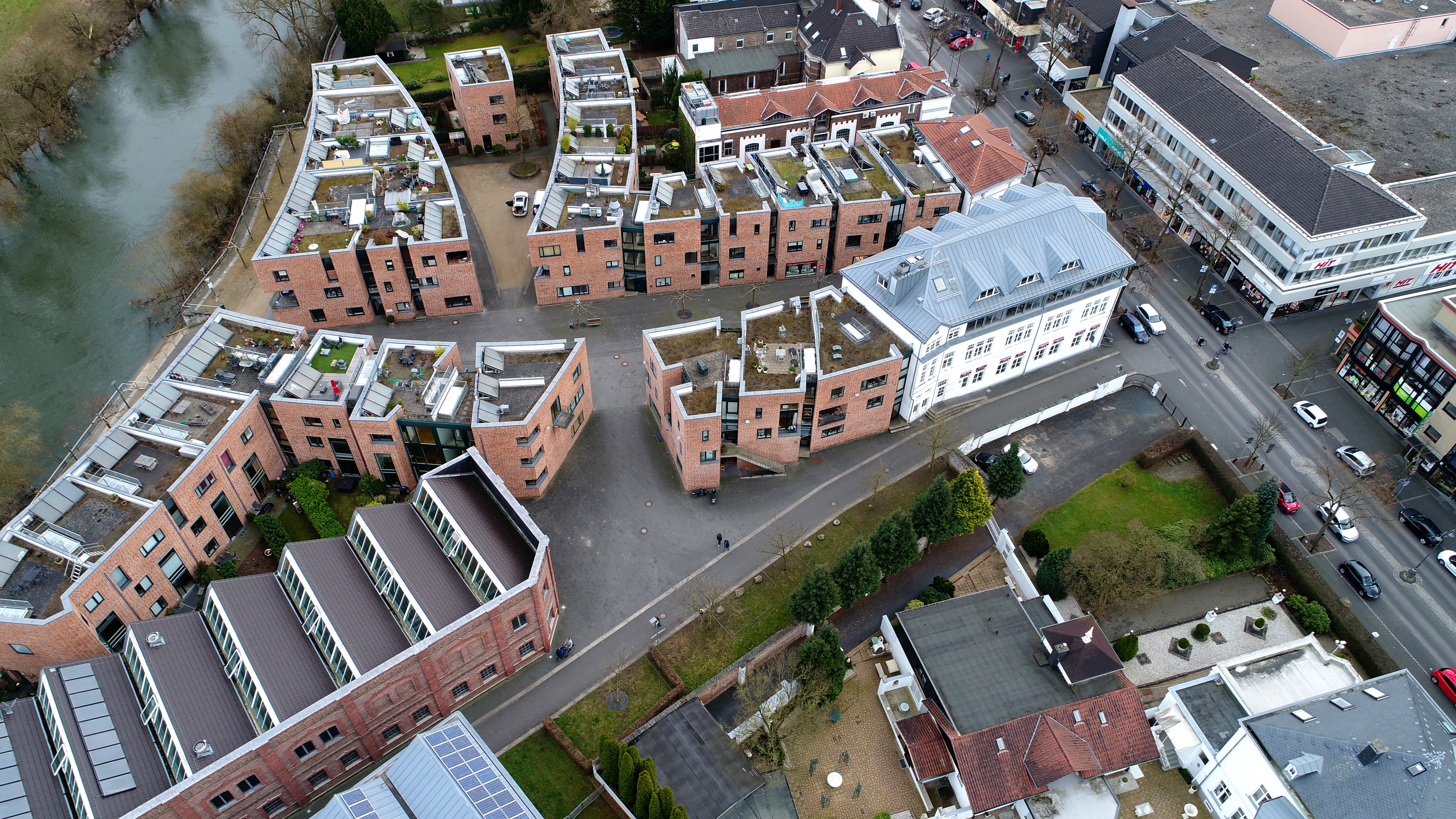 Hennef, Quartier Chronos, Peter Böhm (Architekt), Luftaufnahme (2017)